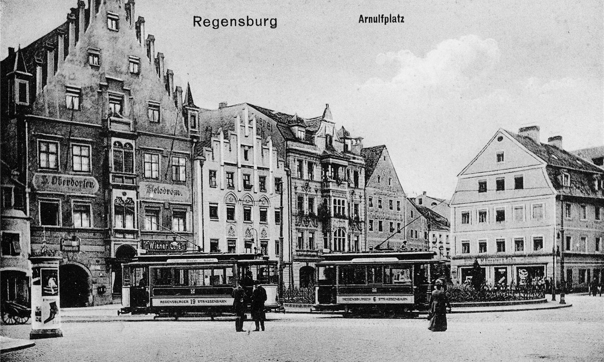 Der Arnulfsplatz in Regensburg im Jahr 1914, im Vordergrund ein Zug der Regensburger Straßenbahn